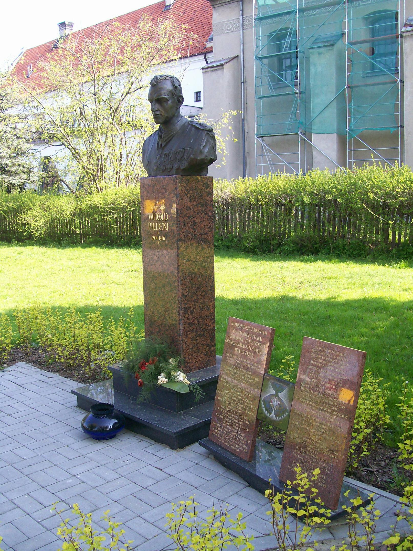 Wieluń - Popiersie Witolda Pileckiego w parku im Rotmistrza Pileckiego